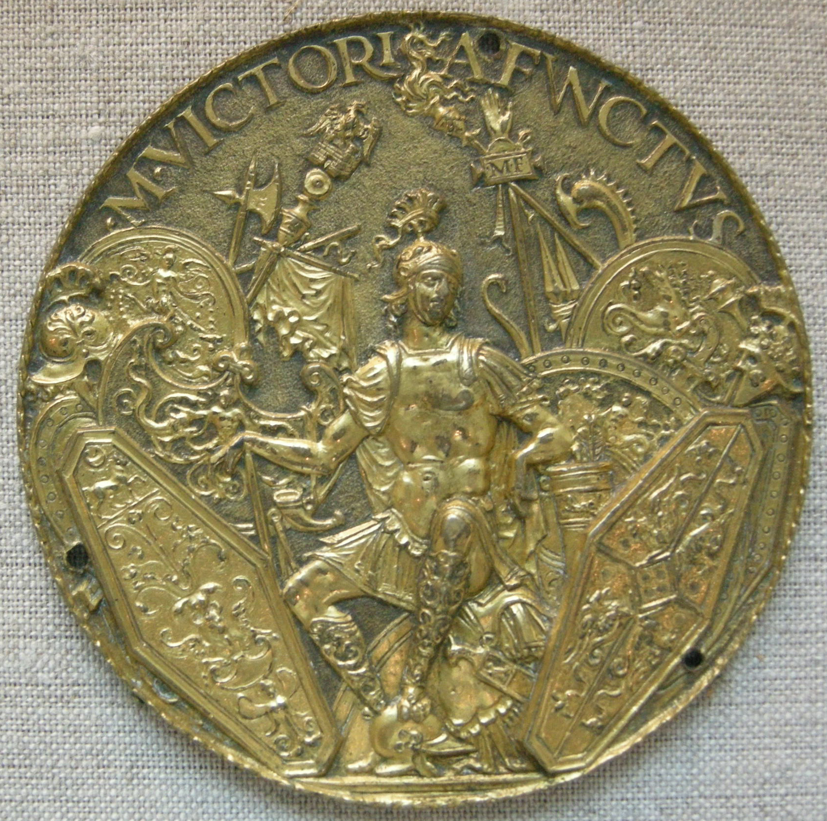 Il moderno, marte vincitore (seconda versione), 1500 circa